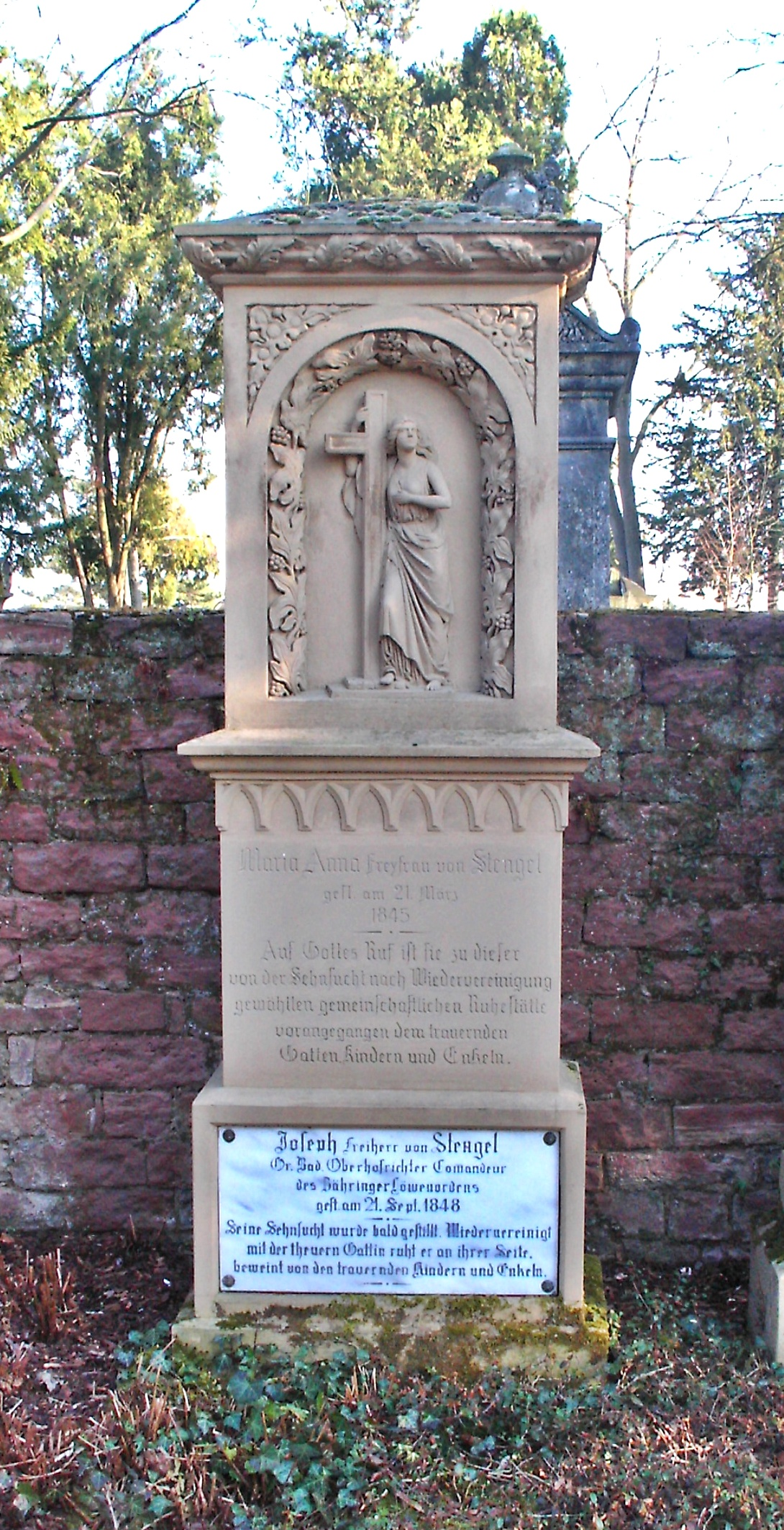 Joseph Gabriel von Stengel (1771-1848) badischer Oberhofrichter in Mannheim, Grabstein Hauptfriedhof Mannheim.